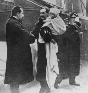 Kong Haakon VII (tidligere Danske prins Carl) ankommer Norge med Kronprins Olav (tidligere prins Alexander) på armen 1905. Bildet er tatt straks etter at kongen og hans følge har forlatt det danske kongeskipet Danneborg i Drøbaksundet og gått over i K/S Heimdal, et kommandofartøy som seinere ble norsk kongeskip, 25. november no:1905. Statsminister Christian Michelsen ønsker velkommen til landet. Heimdal førte så den nye kongefamilien og regjeringa videre inn til Kristiania der følget steig i land ved Akershus festning straks før klokka 13. Tross surt vær og sludd hadde en stor folkemengde møtt fram for å hylle den nye nasjonens folkevalgte regent. NB! Fotografiet er kraftig retusjert. Se [1] for en uretusjert kopi gjengitt med finere punktoppløsning. English summary: Norwegian prime minister Christian Michelsen greets the new Norwegian King Haakon VII (former Danish Prince Carl) and his son Olaf (former Prince Alexander) as they arrive to Norway on a ship in the Oslo Fjord 25th of November 1905.